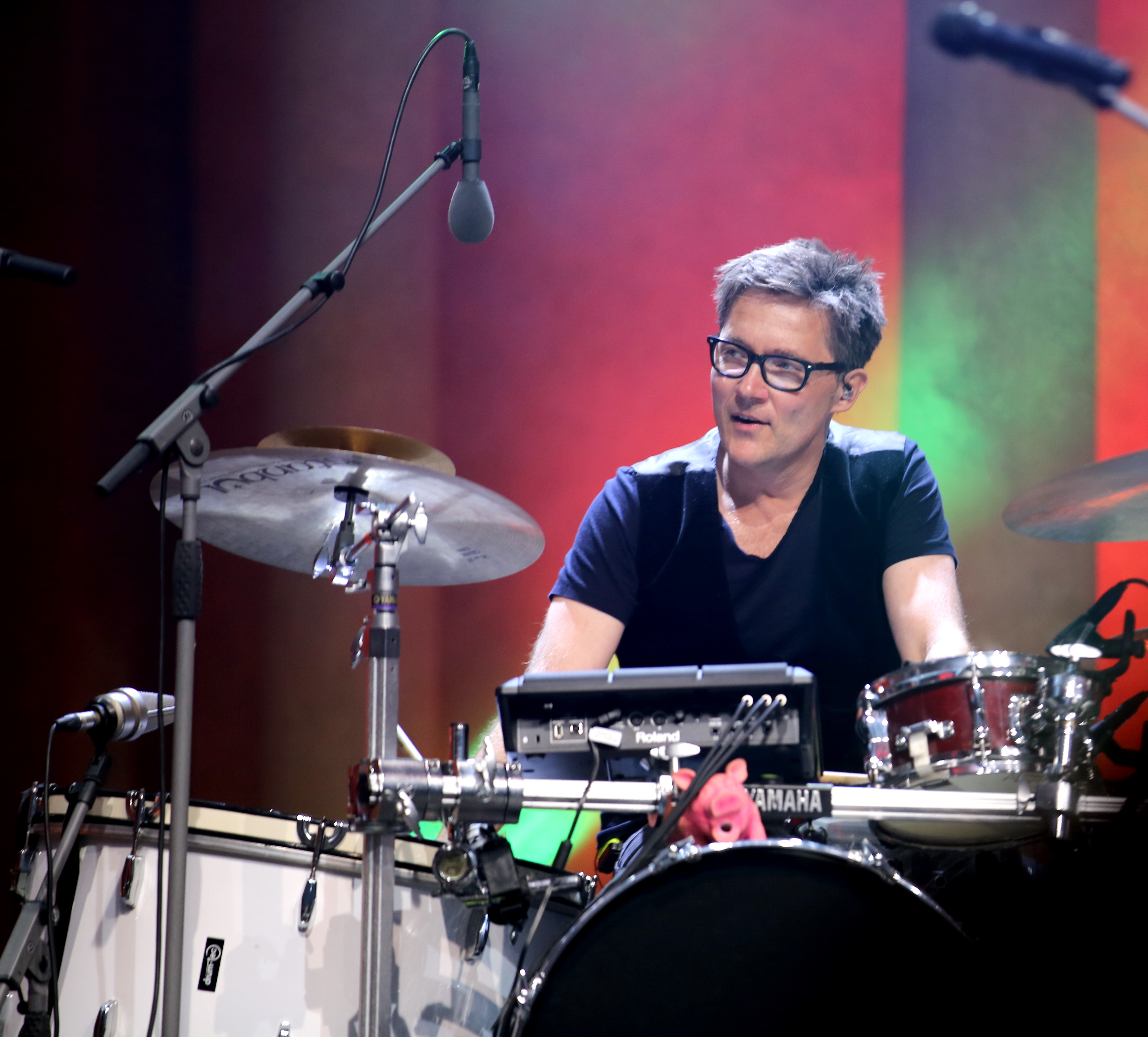 Konstantin Wecker mit Band auf dem Heimatsound Festival 2016 Jo Barnikel (Keyboards, Percussion, Gesang) Severin Trogbacher (Gitarre, Gesang) Jens Fischer Rodrian aka "f i s h e r" (Percussion, Gitarre, Gesang) Fany Kammerlander (Bassgitarre, Cello) Im Bild: Konstantin Wecker